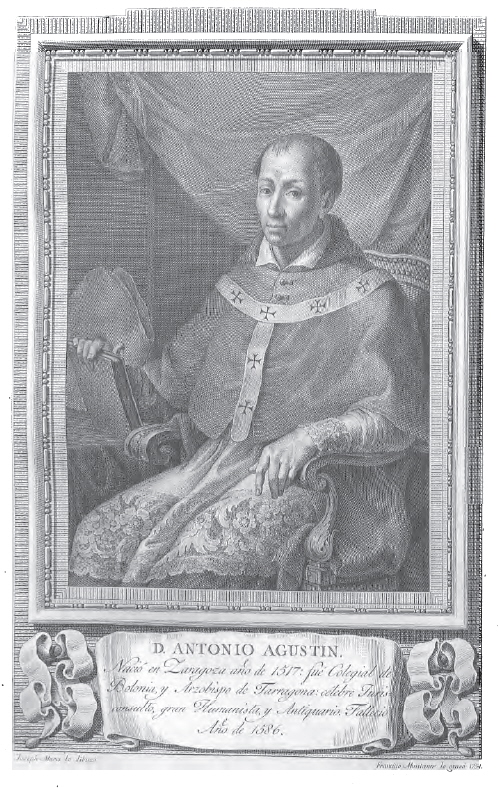 Retrato de Antonio Agustín